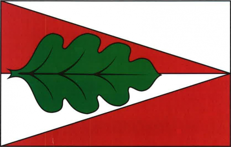 vlajka,Panské Dubenky , okres Jihlava